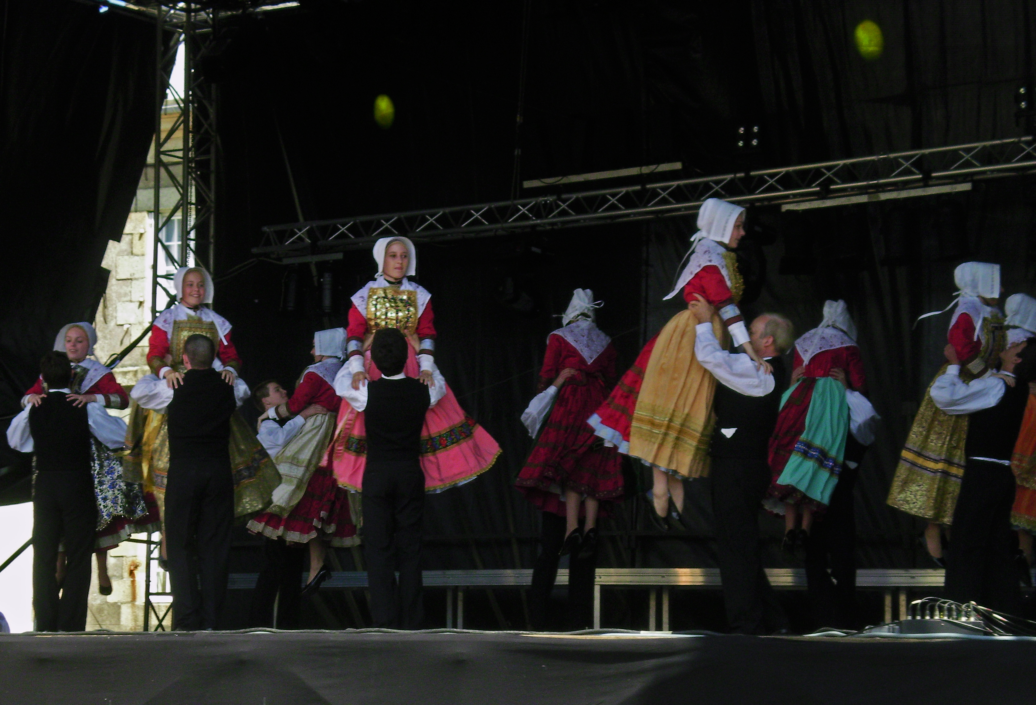 L'ensemble Bleuniadur aux fêtes folkloriques du Léon Kastell Paol (Saint-Pol-de-Léon) le 15 juillet 2012.